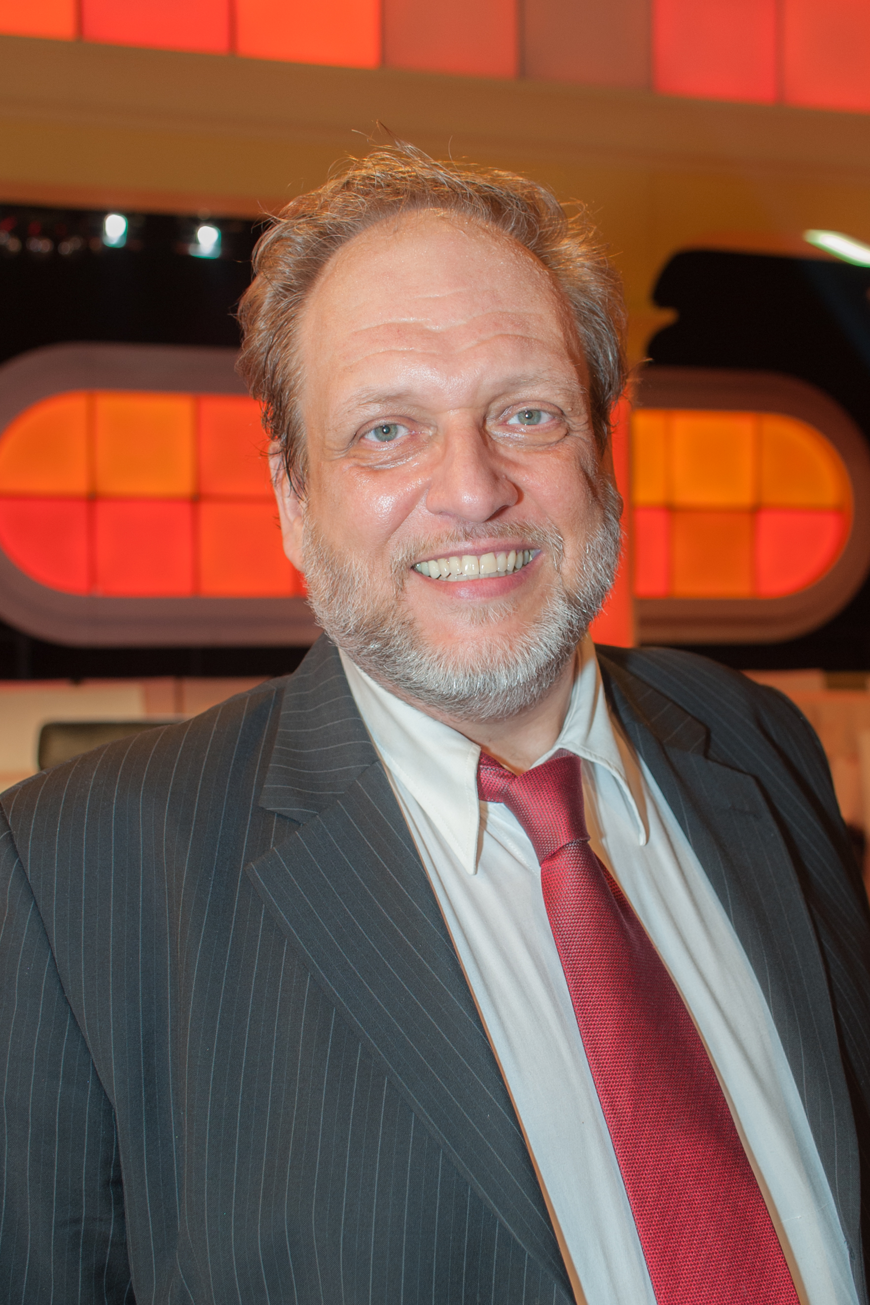 ORF Dancing Stars - Die siebte Show am 15. April 2016. Bild zeigt Andy Woerz